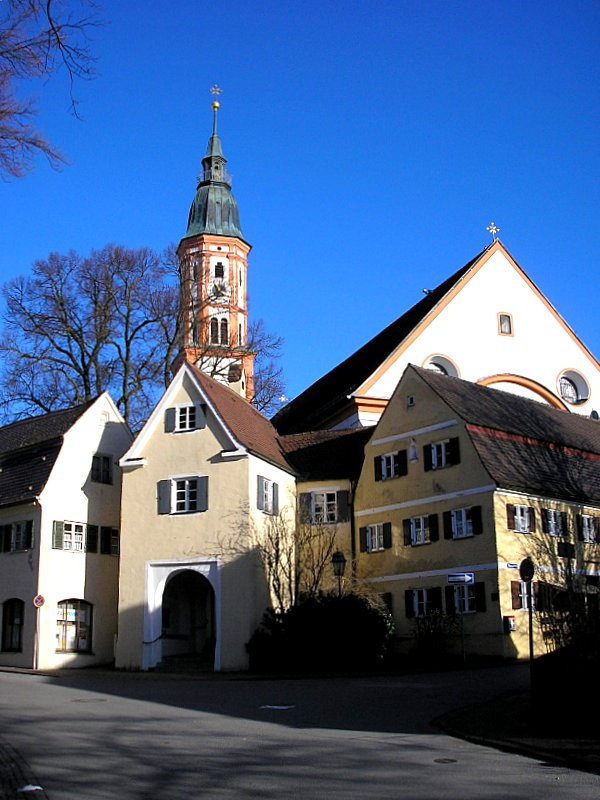 Pfarrkirche St. Michael (Mering, Landkreis Aichach-Friedberg, Bayerisch-Schwaben). Gesamtansicht mit dem Torhaus der ehemaligen Befestigung. Eigene Aufnahme, März 2007 / Parish church St. Michael (Mering near Augsburg, Bavaria, Germany). Total view with the gate of the former fortifications. Own photo, March 2007